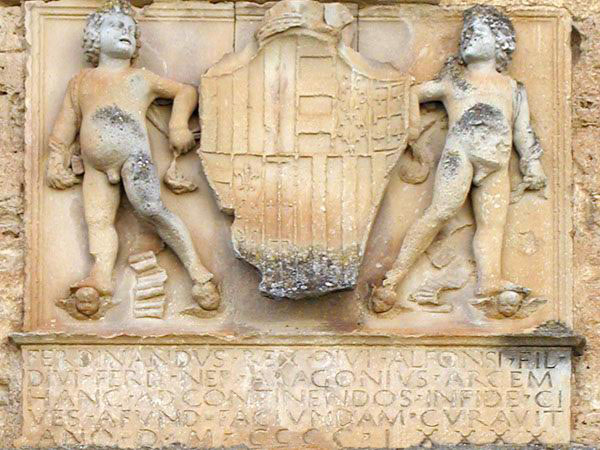 stemma d'aragona che troneggia sull'ingresso del castello aragonese. Si può notare l'incisione in latino "FERDINANDUS-REX-DIVI-ALFONSI-FIL-DIVI-FERD-NEP-ARAGONIUS-ARCEM-HANC AD CONTINENDOS-IN FIDE-CIVES-A-FUND-FACIUNDAM CURAVIT ANO-D-M-CCCC-LXXXX-",che indica appunto il motivoper cui venne edificata la fortezza